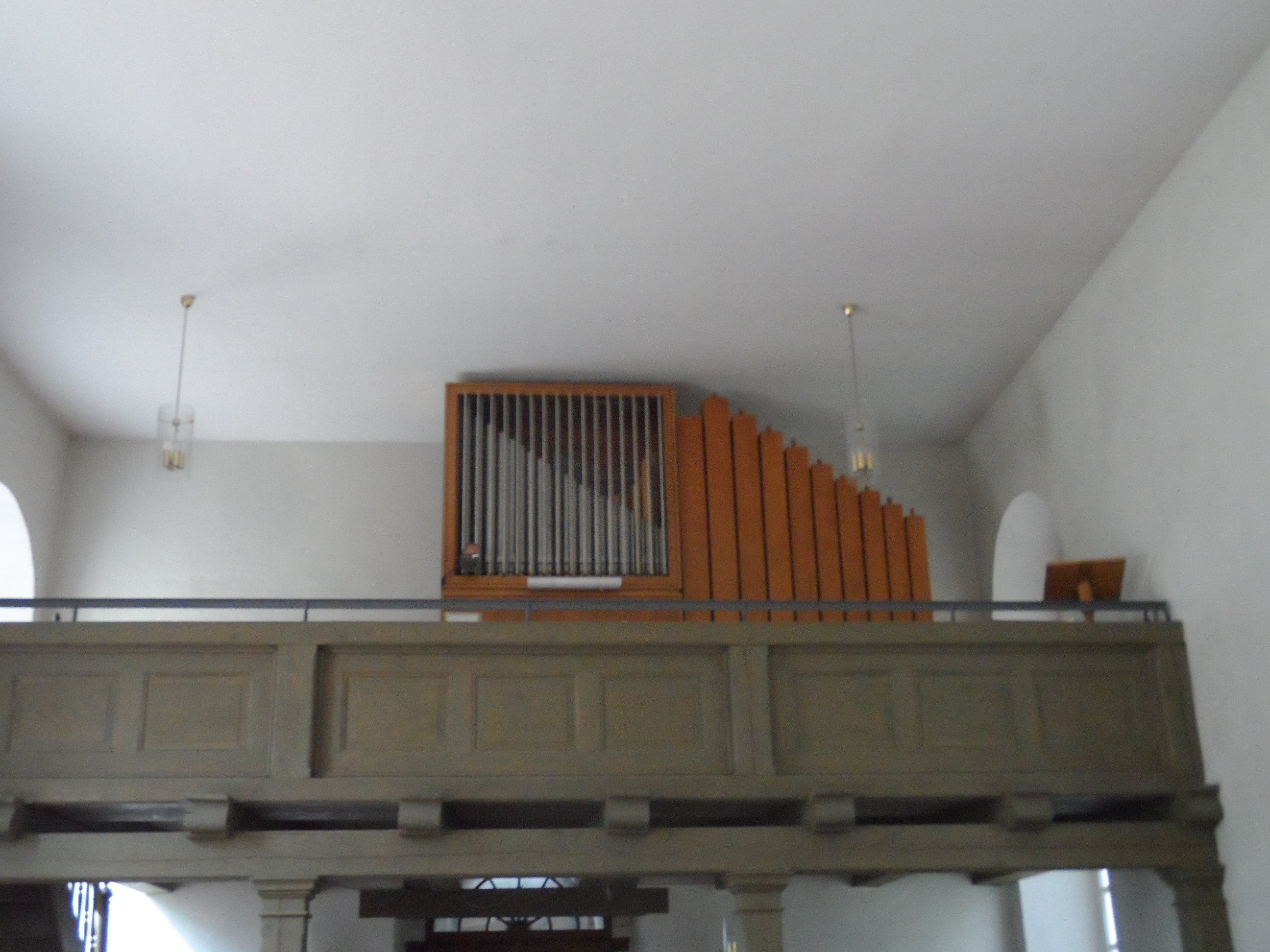 orgelempore